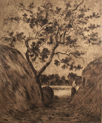 'Heuernte-Bäuerin am Feldrand das Tagwerk betrachtend', Radierung auf Bütten, 1898, ca. 52 x 44,5 cm